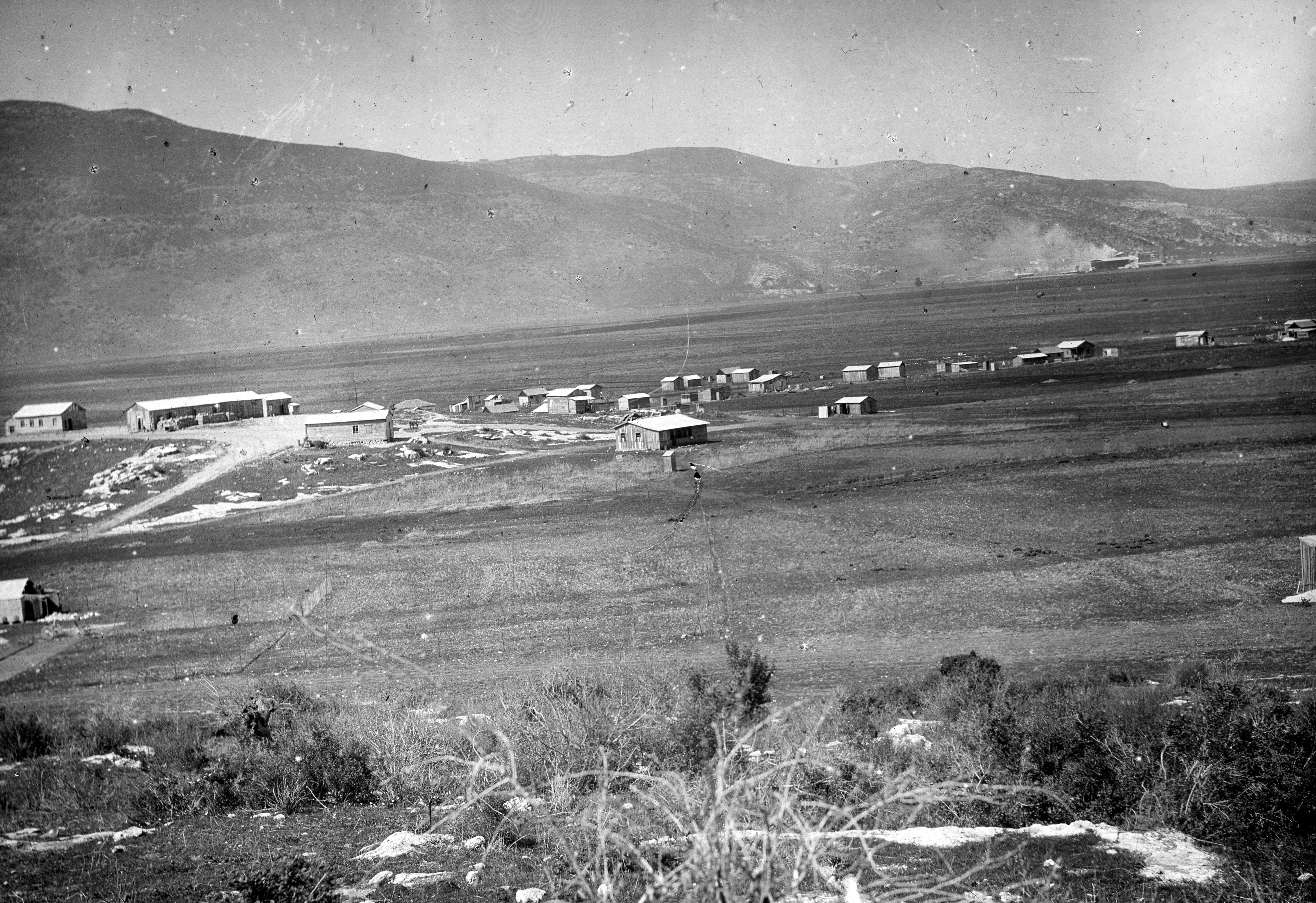 בתי היישוב "נחלת יעקב" אחד משני היישובים שלאחר מכן אוחדו לכפר חסידים. מימין למעלה הית חרושת למלט "נשר"